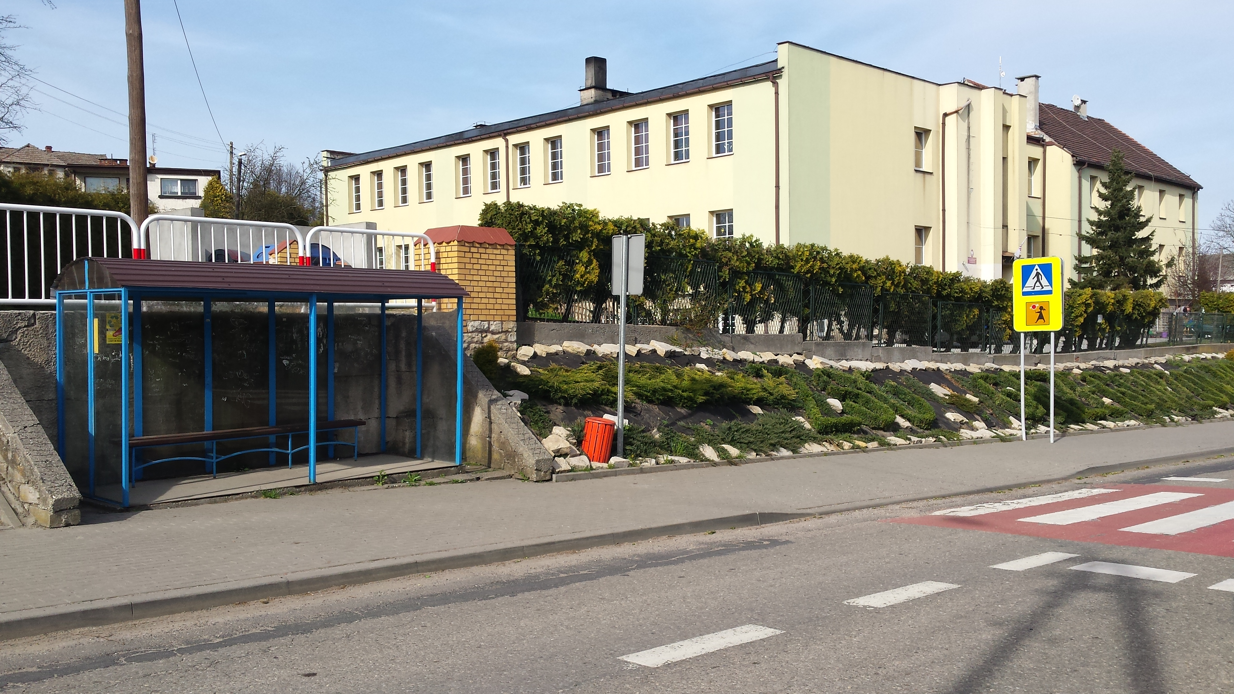 ZSO Grzegorzowice